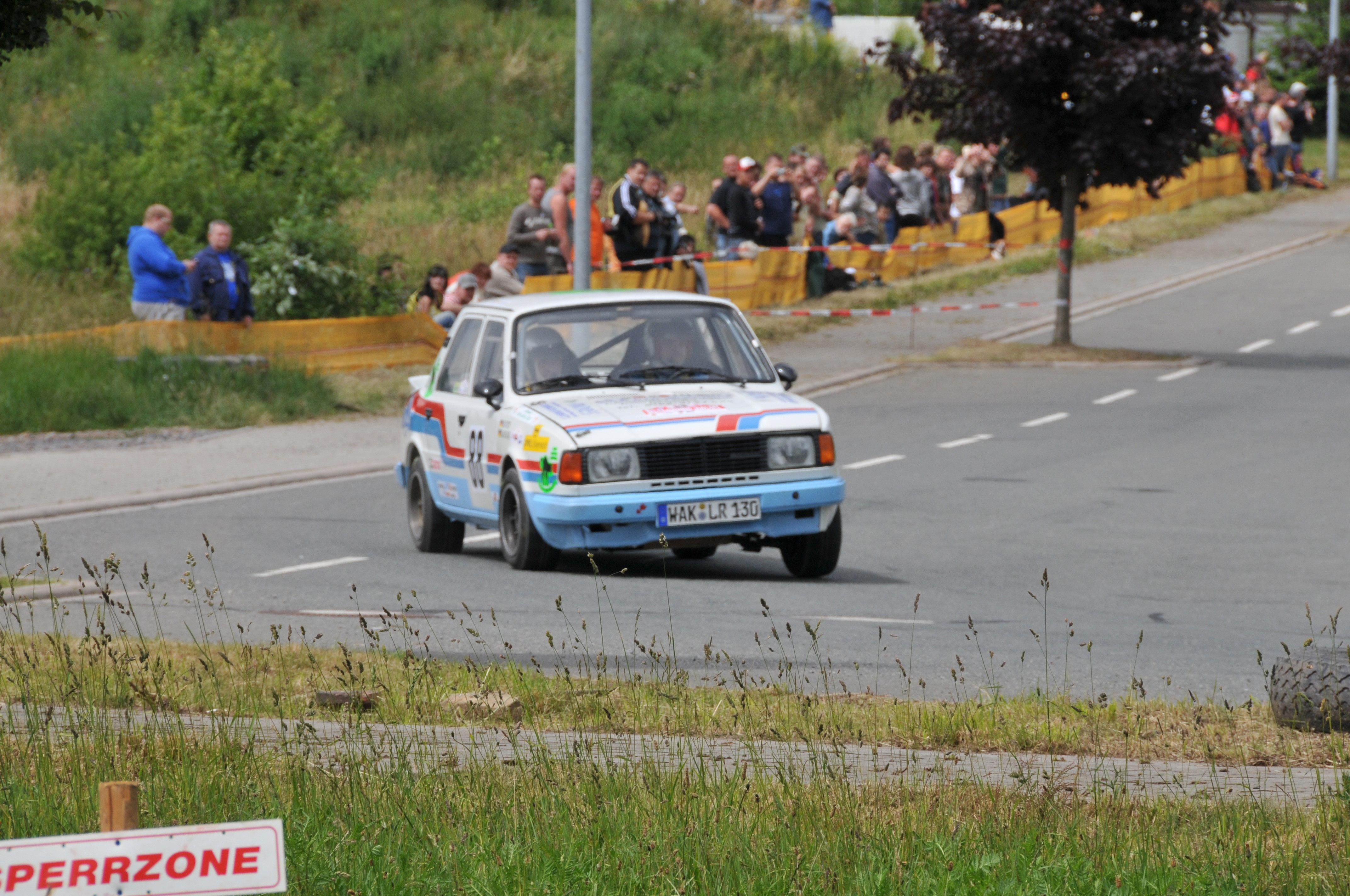 Jürgen KayserJens Roth auf Skoda 130 LR